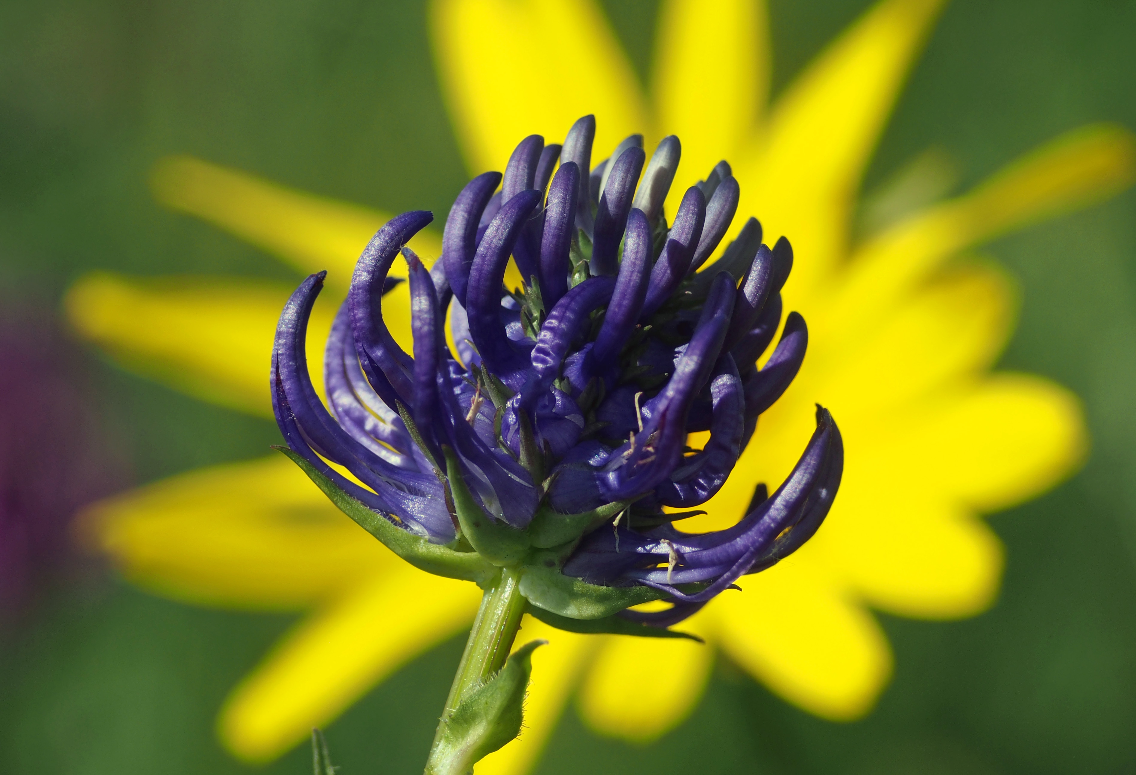 Teufelskralle vor wilder Ringelblume in der Nähe des Badberges im Kaiserstuhl bei Alt-Vogtsburg